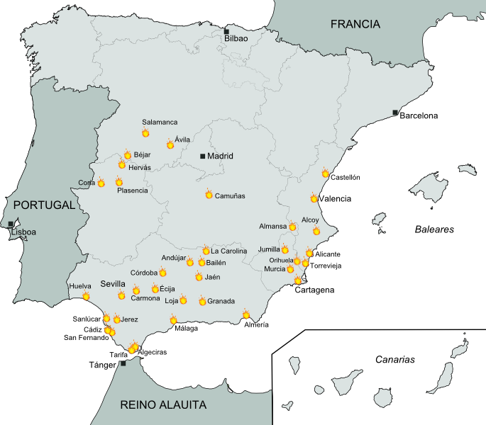 Sublevación cantonal de 1873.